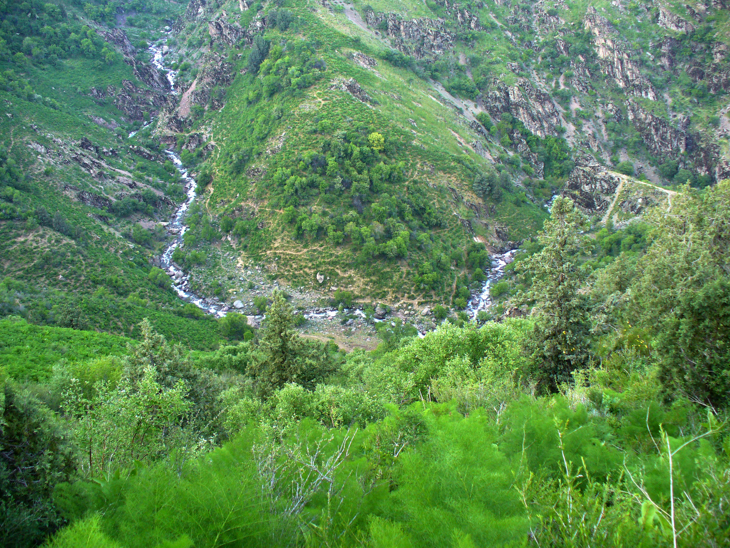 Долина реки Кизилсу около берёзовой рощи. Бостанлыкский район, Ташкентская область, Республика Узбекистан.